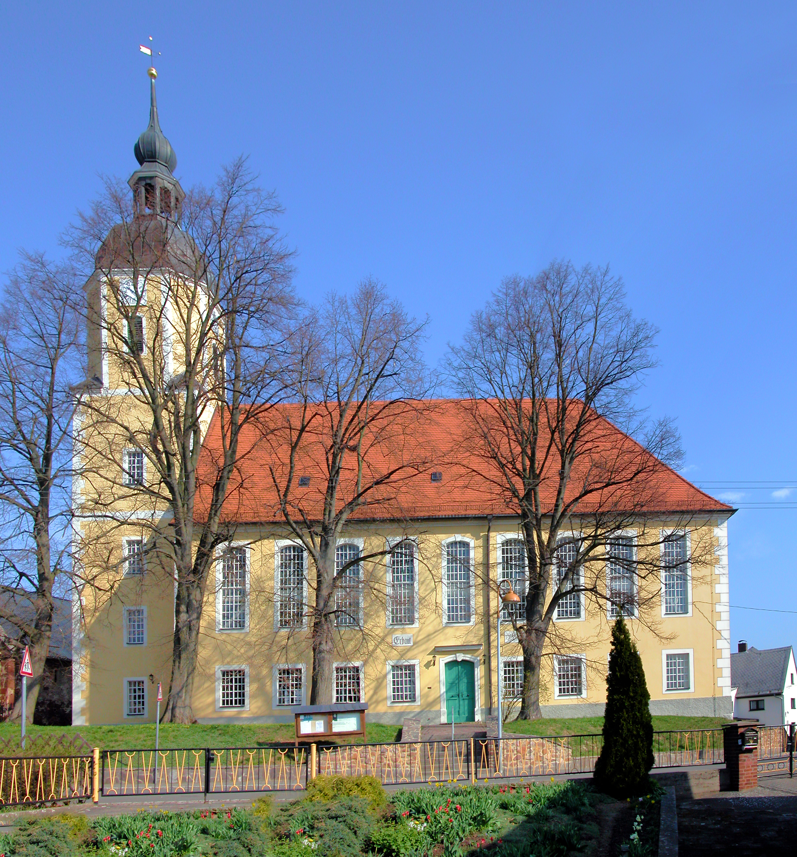 13.04.2010 04668 Zschoppach (Grimma), Kirchstraße 2 (GMP: 51.214388,12.885833): Evangelische Dorfkirche Zschoppach von Süden. Erbaut 1833, saniert fertig 2003. [DSCN40894-40895.TIF]20100413025MDR.JPG(c)Blobelt